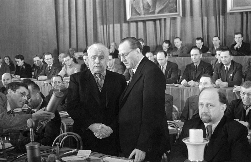 Original image description from the Deutsche FotothekPorträt: Ernst